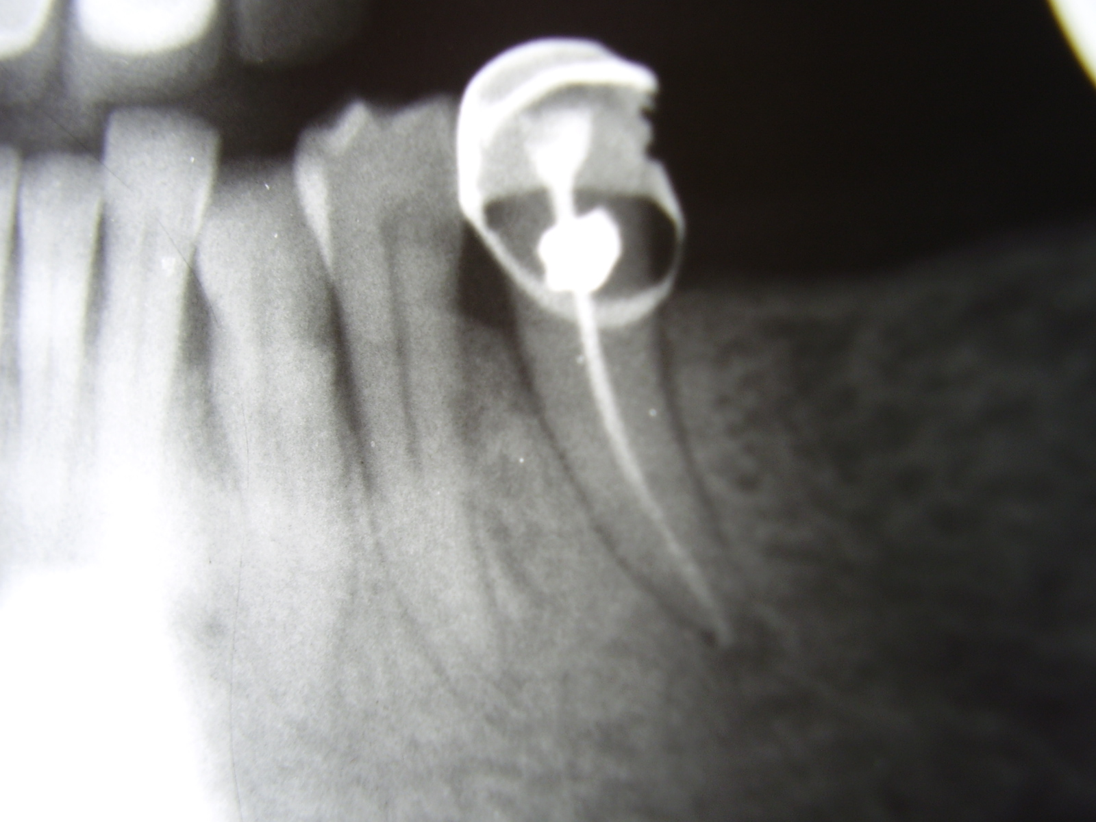 Dental X-ray